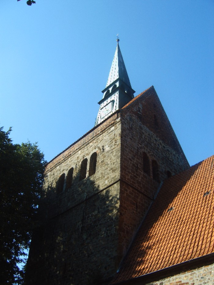 Kirchturm der St.-Cyrakus-Kirche in Bruchhausen-Vilsen